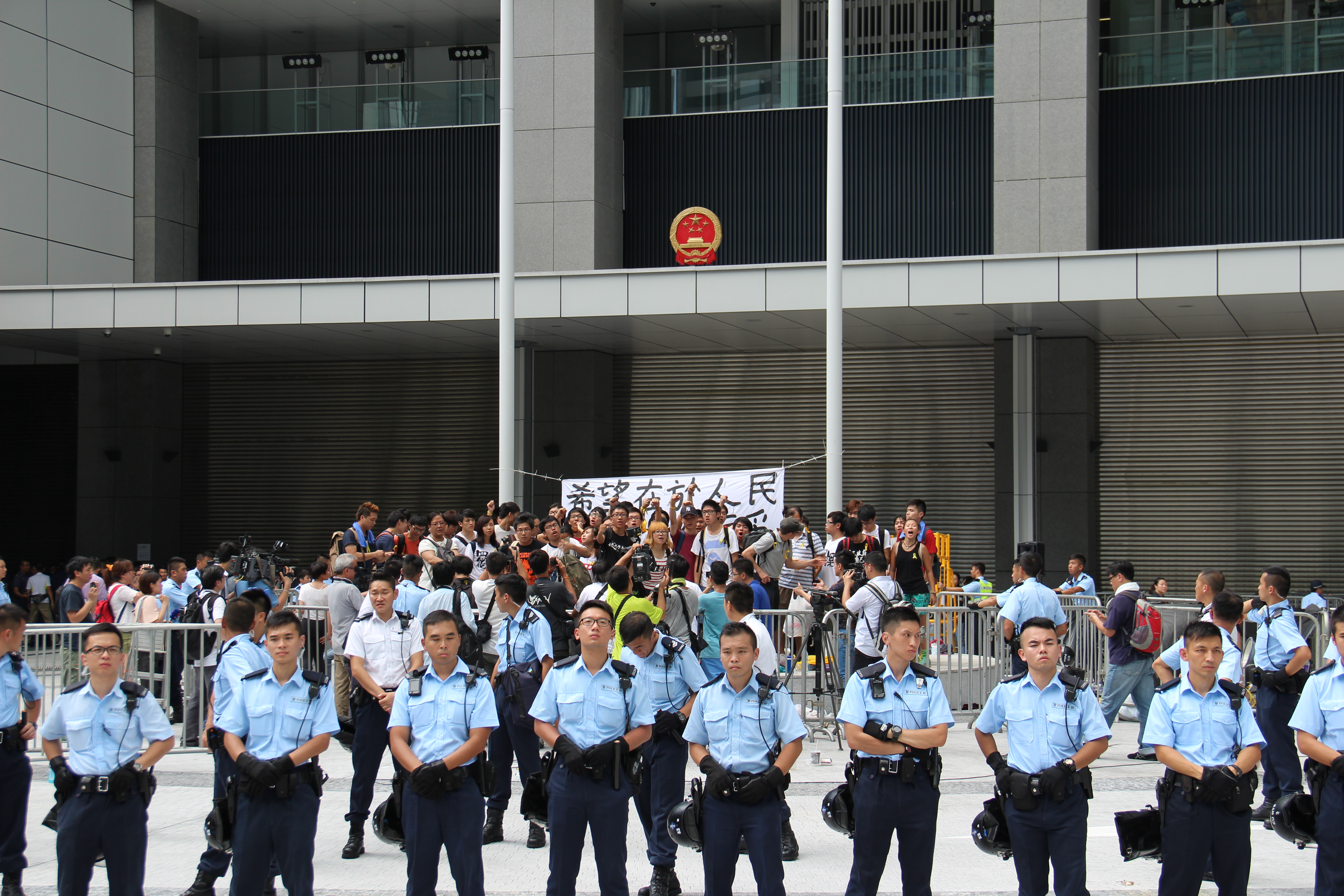 警方準備在公民廣場清場前堅守的學生和市民高呼口號